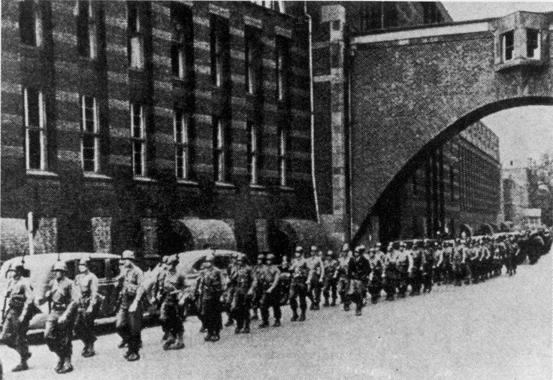 Einmarsch US-Armee im Werk Höchst (Behrens-Bau im Hintergrund)